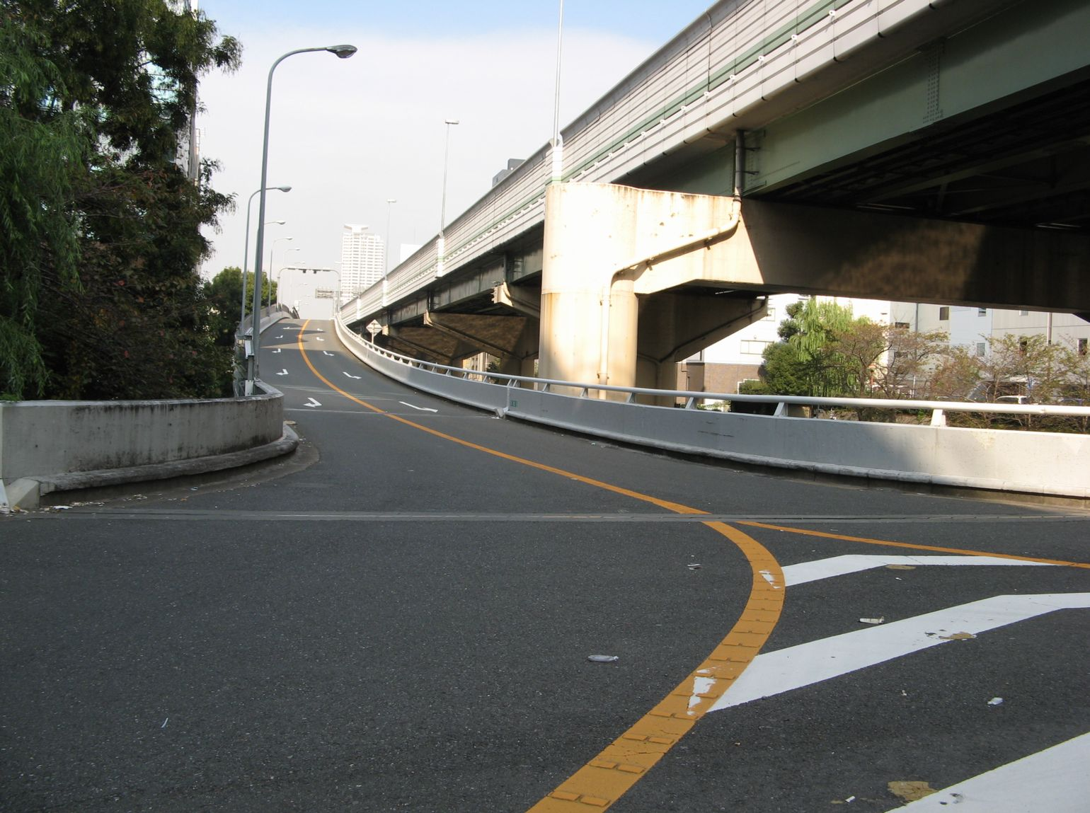 阪神高速ja:本町出口 北望